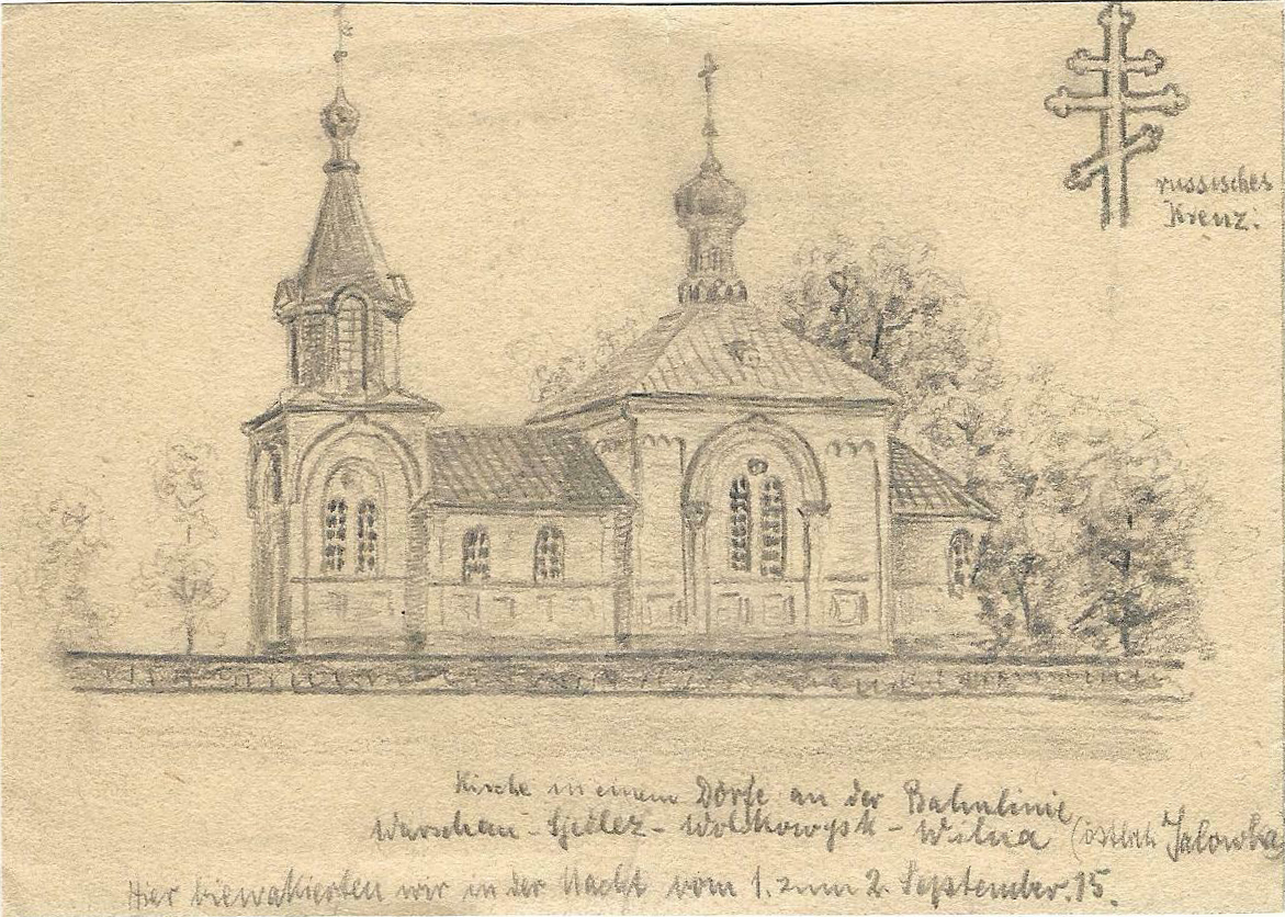 Беларуская (тарашкевіца): Ятвеск (Jatviesk). Пакроўская царква-мураўёўка